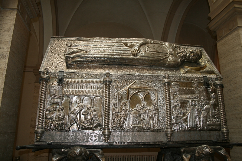 Svečano proglašenje i predstavljanje novih članova Hrvatske akademije znanosti i umjetnosti u Zagrebu